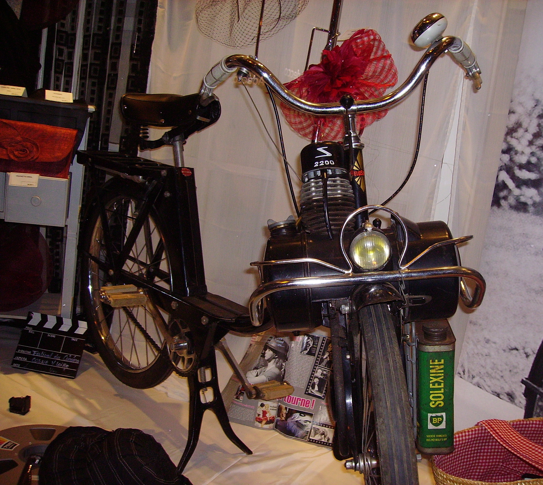 VéloSoleX S2200 avec bidon de Solexine, dans une vitrine de magasin en France.